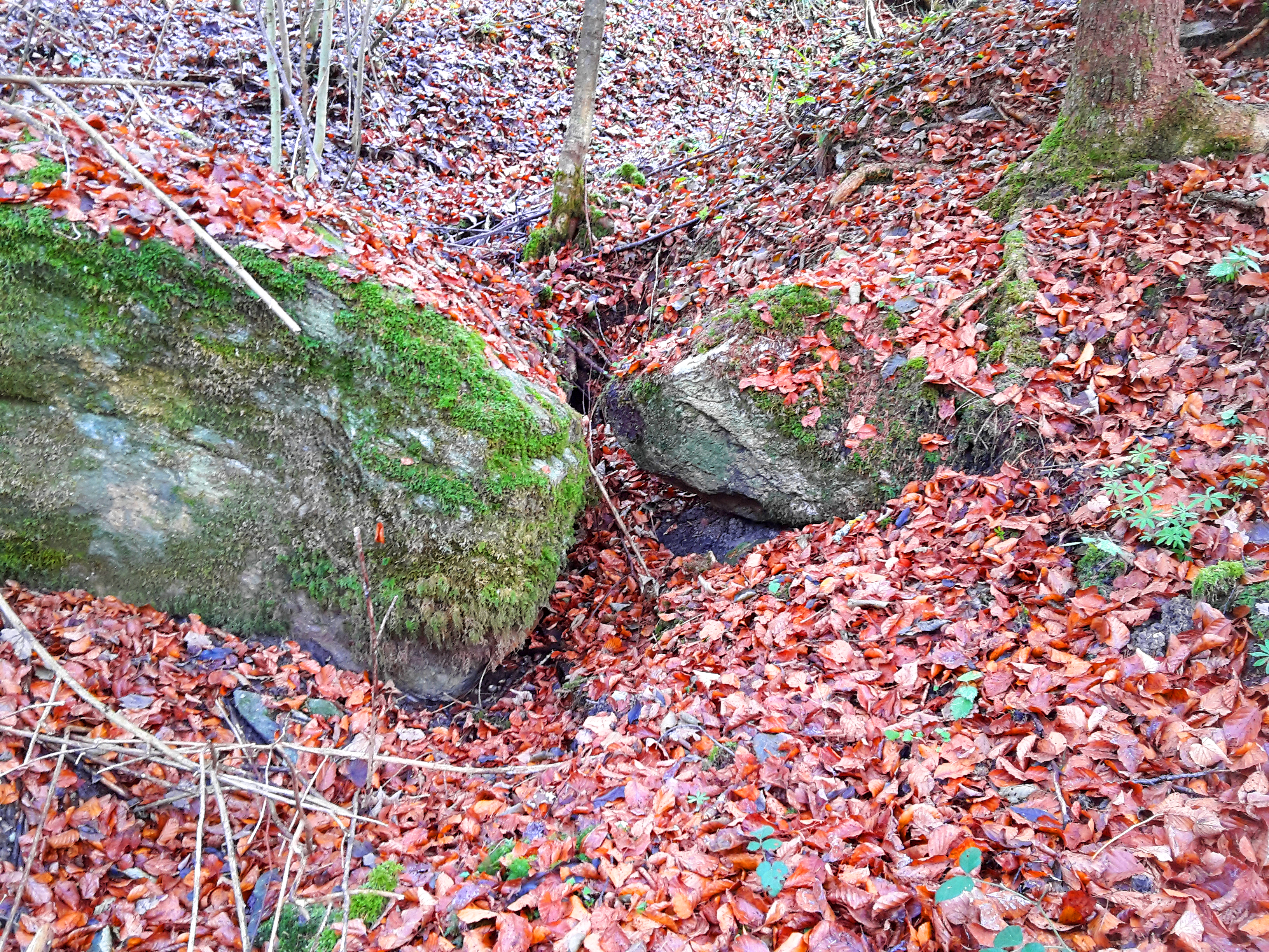 Aegertenbach kurz nach der Quelle beim Eintritt in ein kleines Tobel mit Findlingen im Waldgebiet Honeret, Dietikon